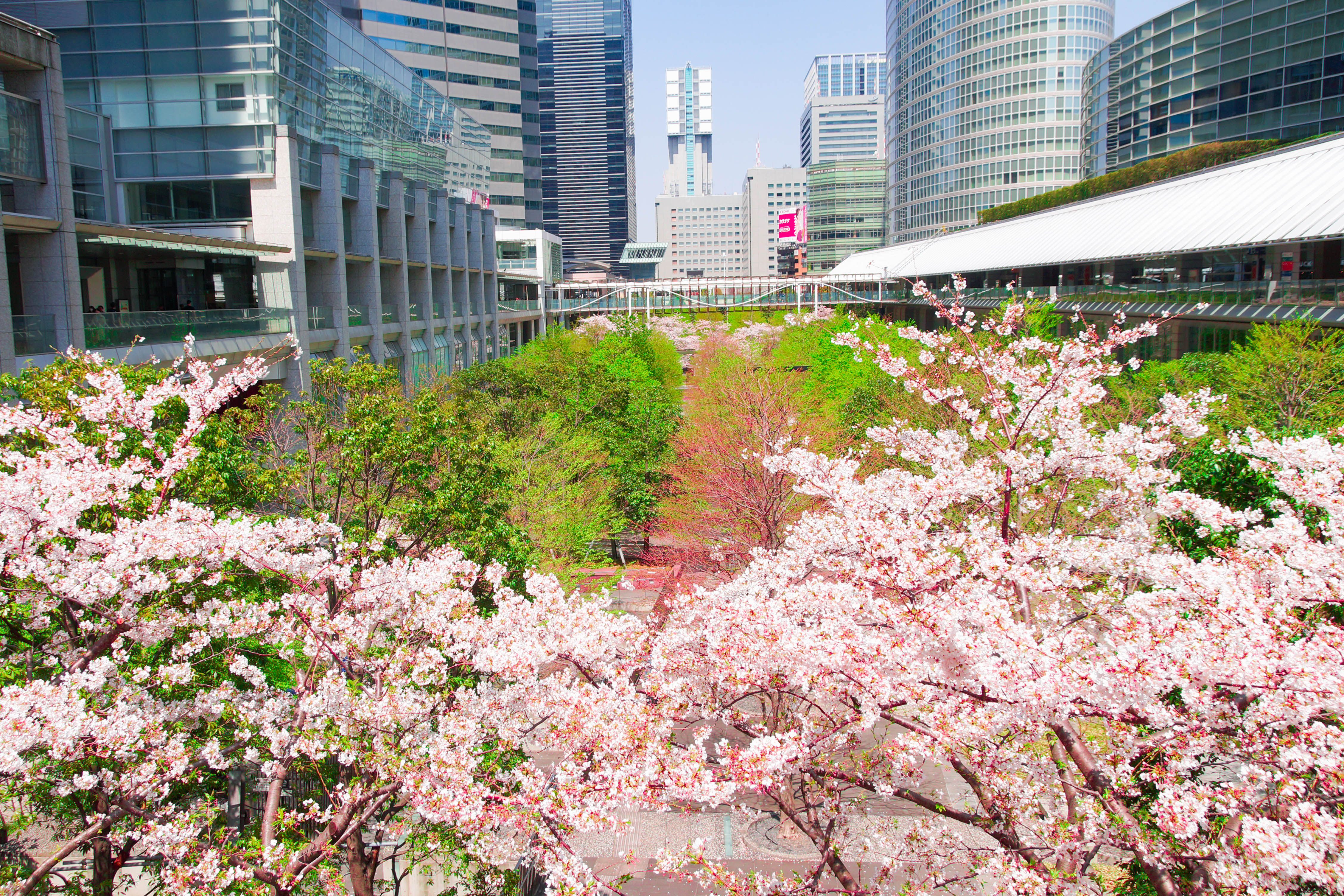 品川インターシティセントラルガーデン Sony SLT-A57